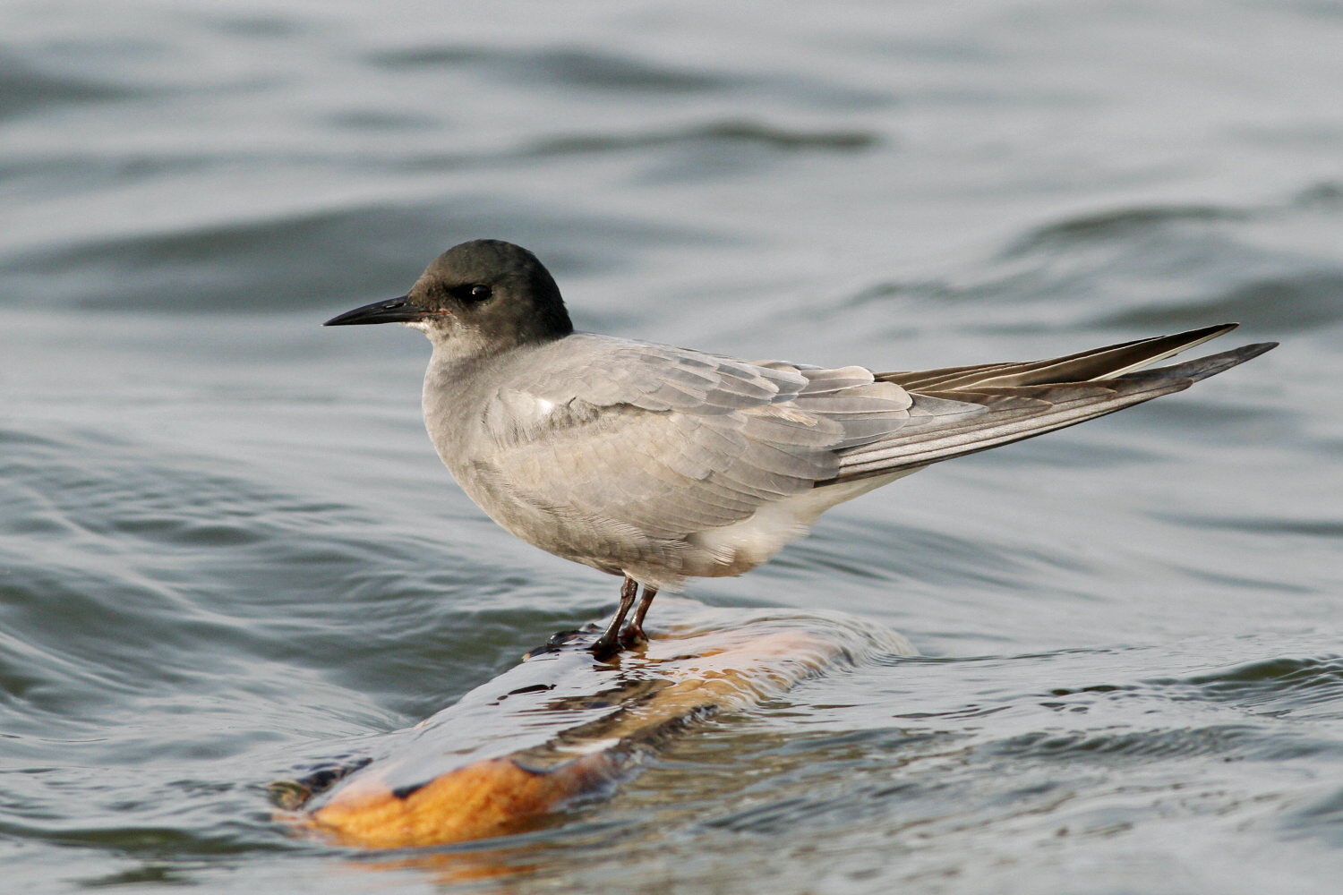 Hrušovská zdrž